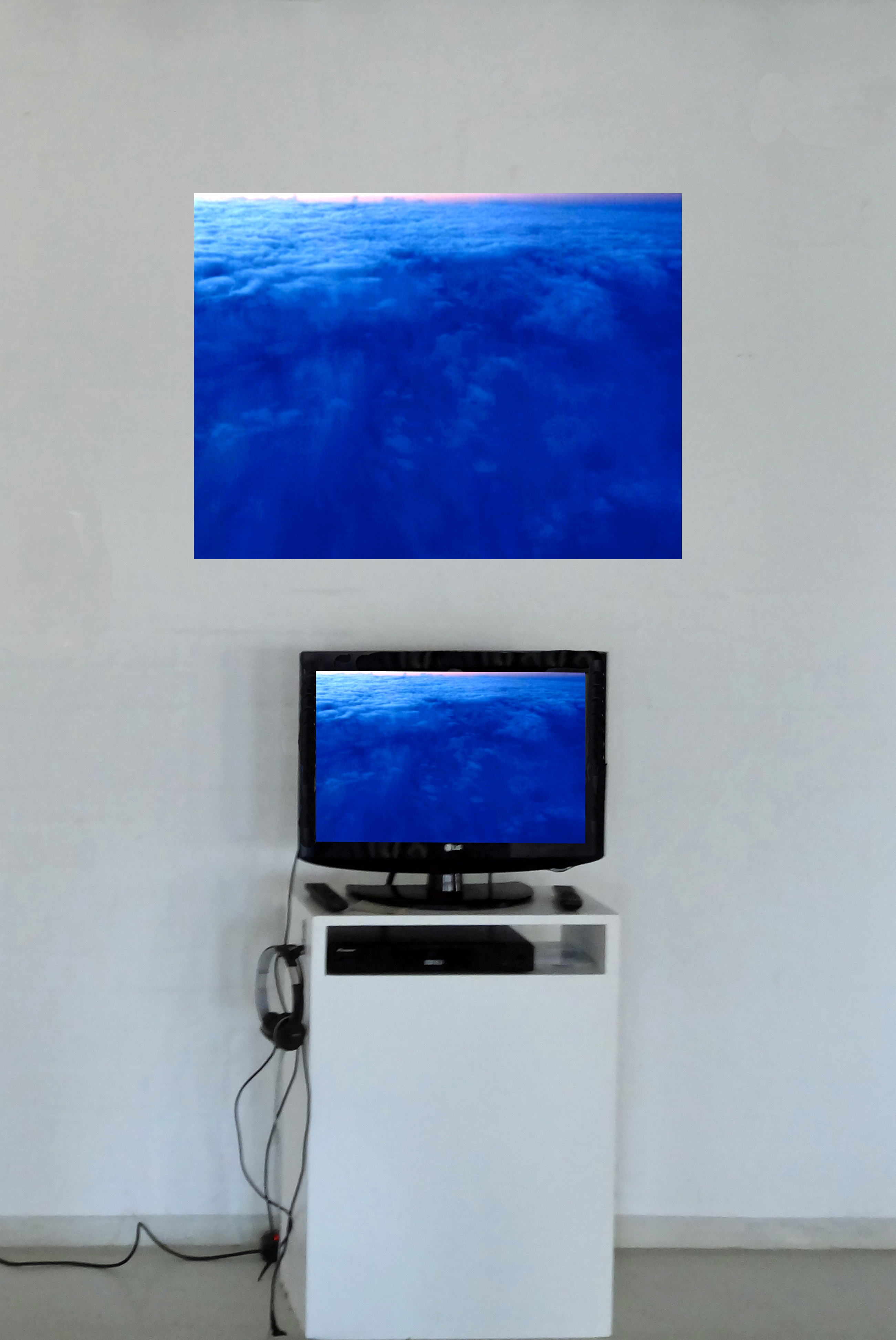 2019 - „Wolkenmeer / Space 11 (Sea of Clouds), op. 166,1 / 2013“: Experimentelles Musikvideo für Violoncello und elektroakustische und elektronische Musik, Fotografie von einer Ausstellung in der Fabrik der Künste, Hamburg, 2019, oben ein Videostill auf Aludibond (90 x 120 cm) und unten das geloopte Video in einer Installation, Fotografie von Wittwulf Y Malik